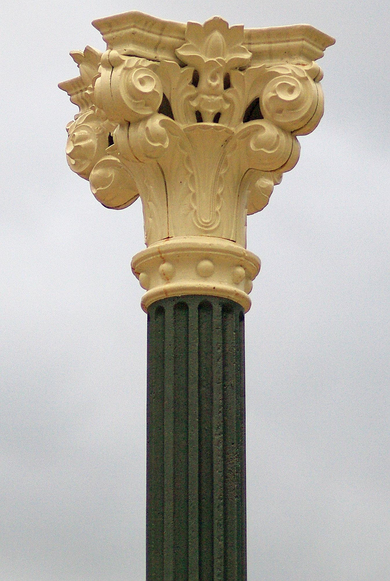 Die Bilder enstanden am 20.10.2010 im Rahmen eines Treffens der DFN-Stammtisches Freiburg